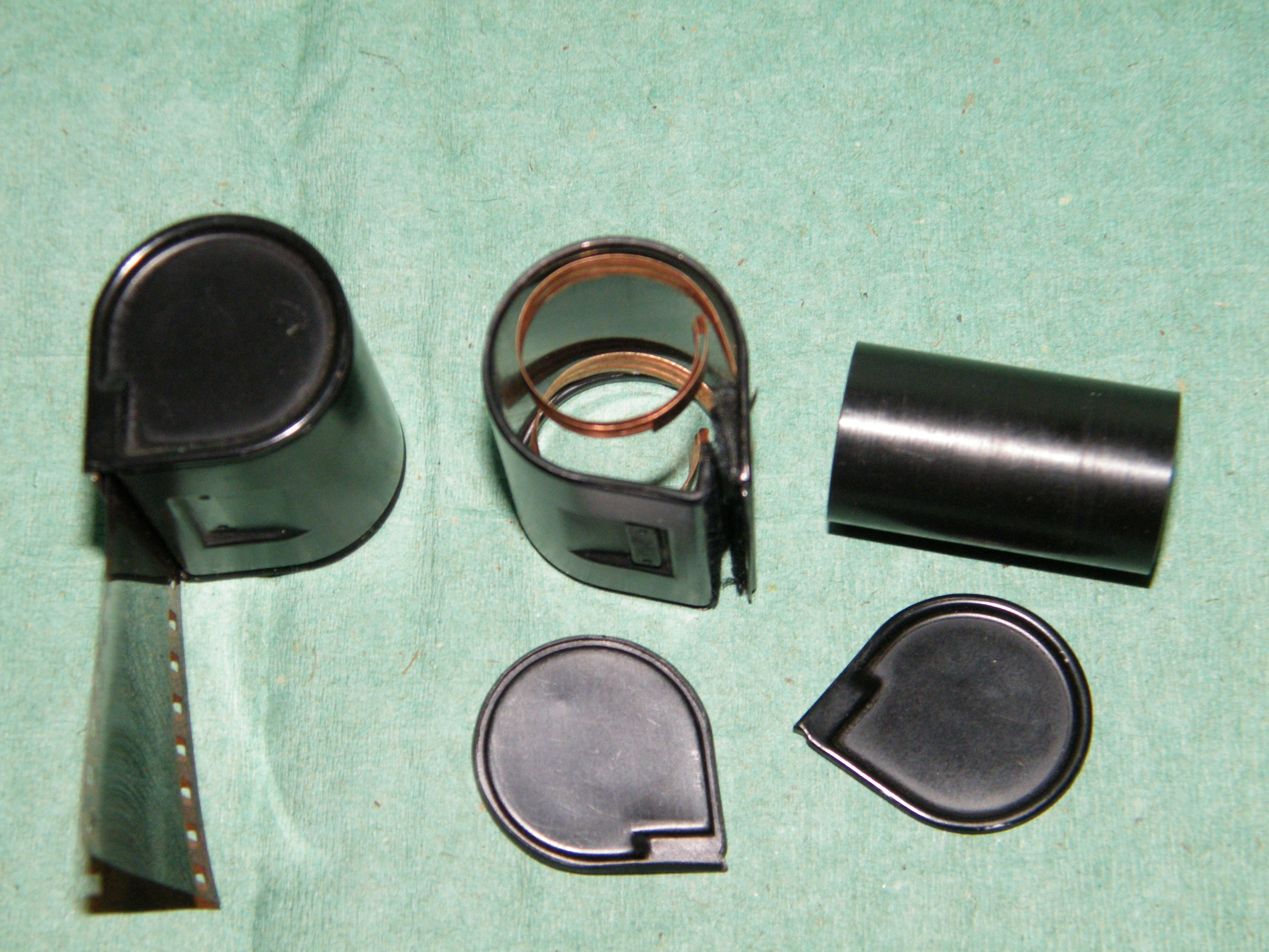 Устройство фотографической кассеты "Рапид"